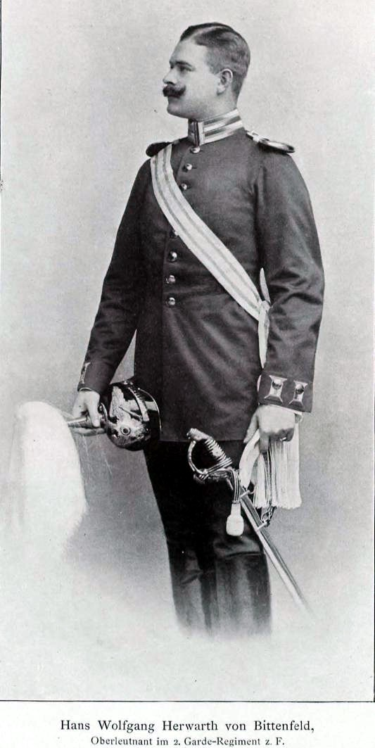 Hans Wolfgang Herwarth von Bittenfeld (1871-1942), deutscher Offizier, Diplomat (Militärattaché), Publizist und Ministerialbeamter.